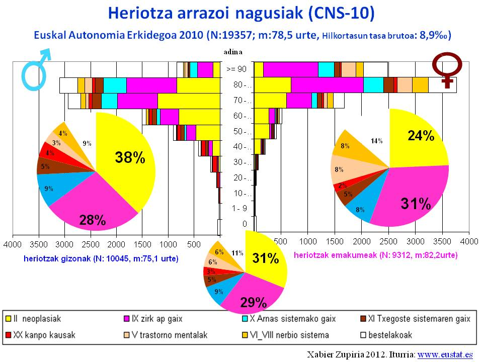 2010. urtean Euskal Autonomia Elkartean izandako heriotzak, heriotza arrazoiaz, sexuaz eta adinaz sailkatuta.